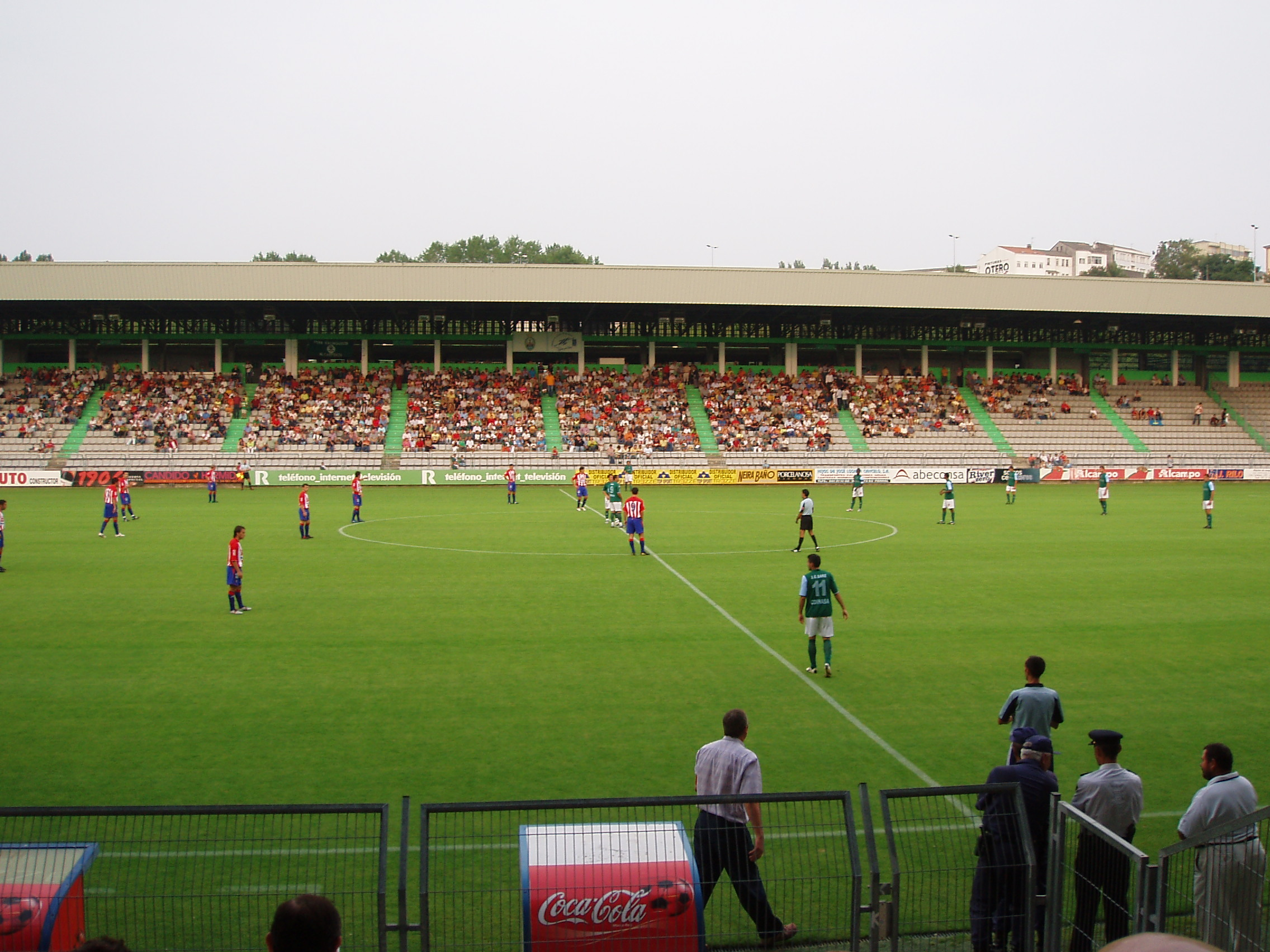 Instantes previos al comienzo de la disputa del XLVI Trofeo Concepción Arenal, que disputaron en agosto de 2005 el Racing Club de Ferrol y el Real Sporting de Gijón.